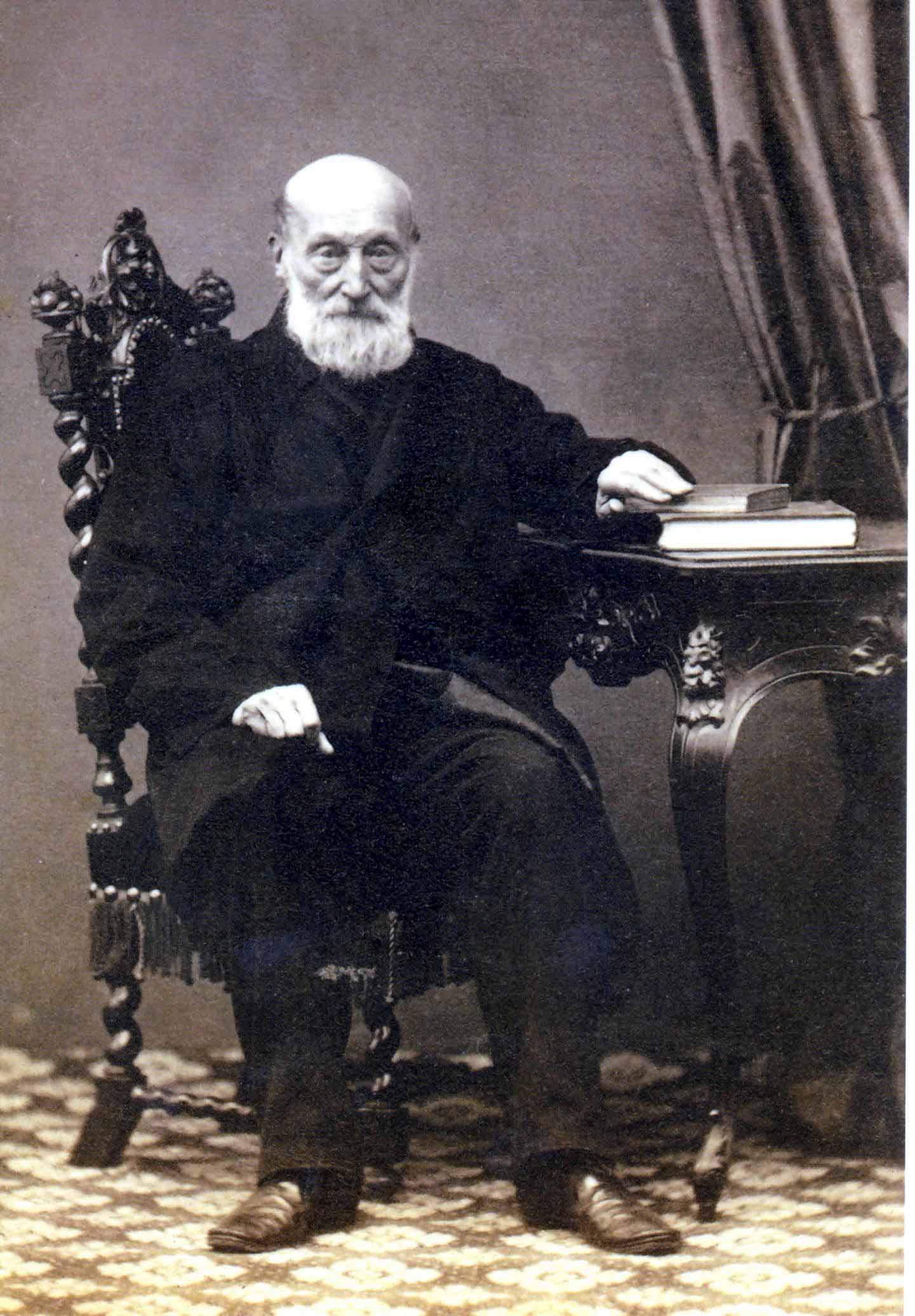 autore sconosciuto, riproduzione da foto originale, ritratto di Giampietro Vieusseux, opera il cui autore è morto da più di 70 anni, , acquisita da scanner